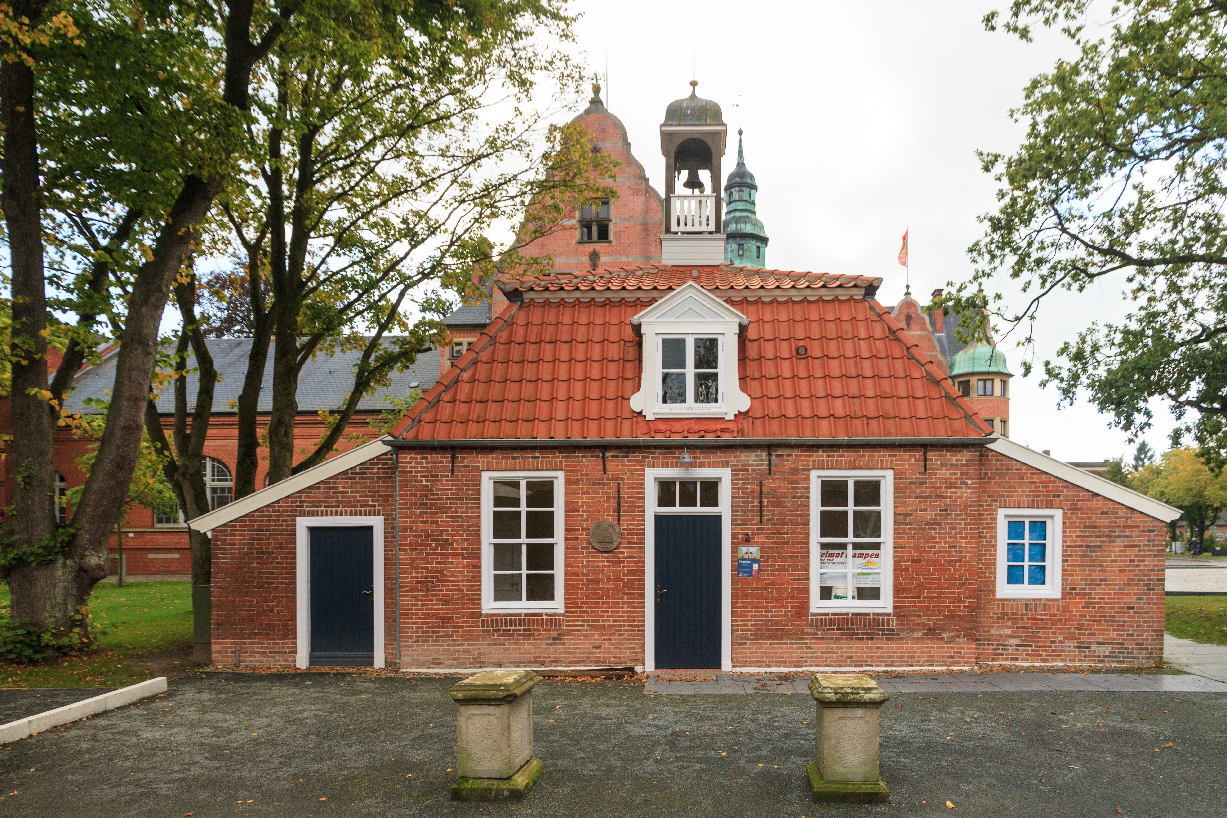 Das Pingelhus wurde um 1800 im Zuge des Hafenbaus von der Treckfahrtgesellschaft erbaut. Es wurde seinerzeit als zweigeschossiges Gebäude für den Hafenwärter und als Speditionsgebäude gebaut. Als der Hafen 1934 in diesem Bereich zugeschüttet wurde, ist das untere Stockwerk mit verschüttet worden. Der Name Pingelhus kommt von dem ostfriesischen pingeln (läuten), das immer ertönte, wenn das Fahrgastschiff nach Emden ablegte. Seit 1959 wird das Gebäude vom Heimatverein Aurich genutzt. Das Gebäude wurde wahrscheinlich von Conrad Bernd Meyer entworfen.